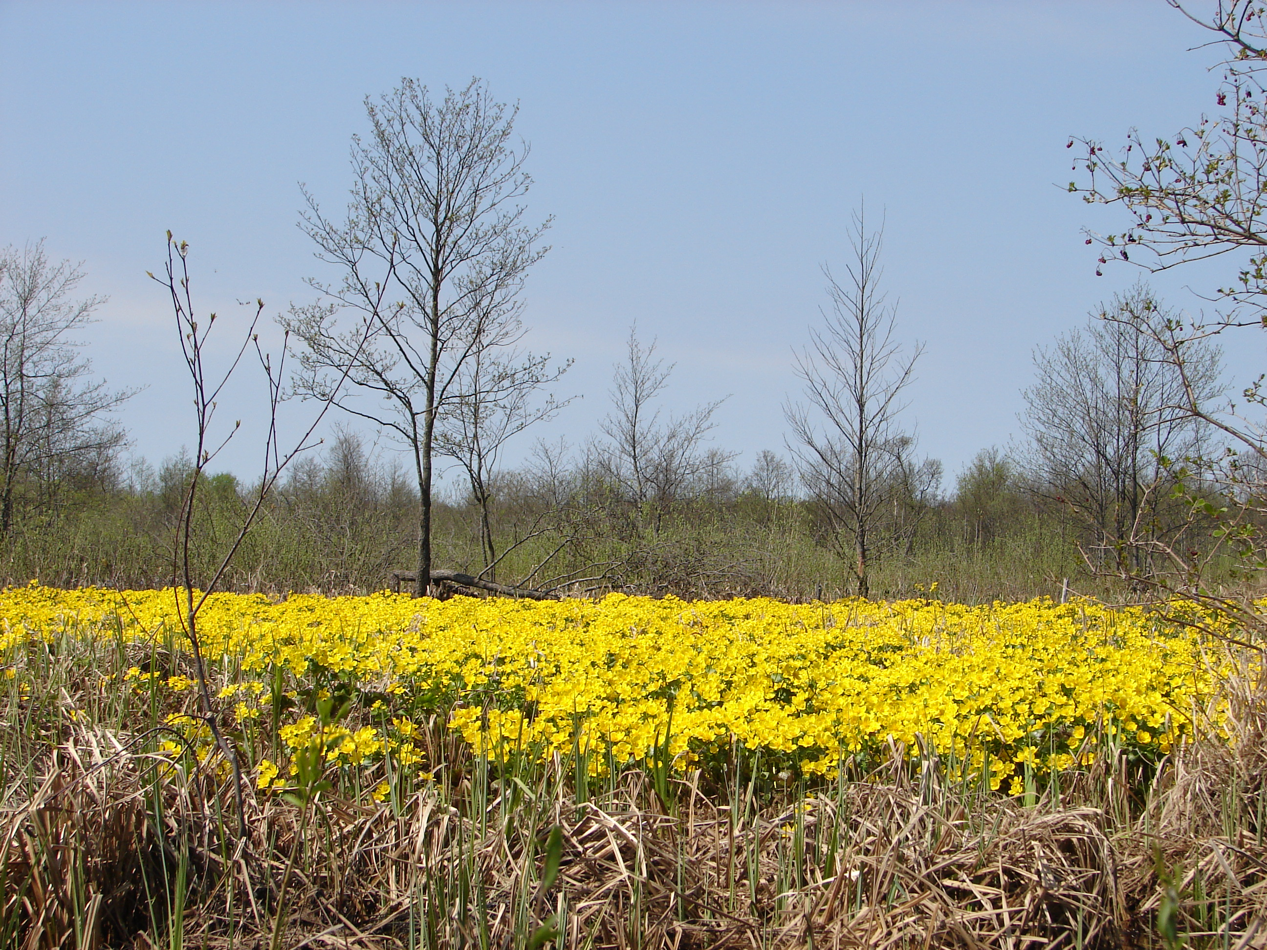 «Прип'ять-Стохід», Любешівський р-н, ДП «Любешівське ЛМГ», ДП СЛАП «Любешівагроліс», с/р